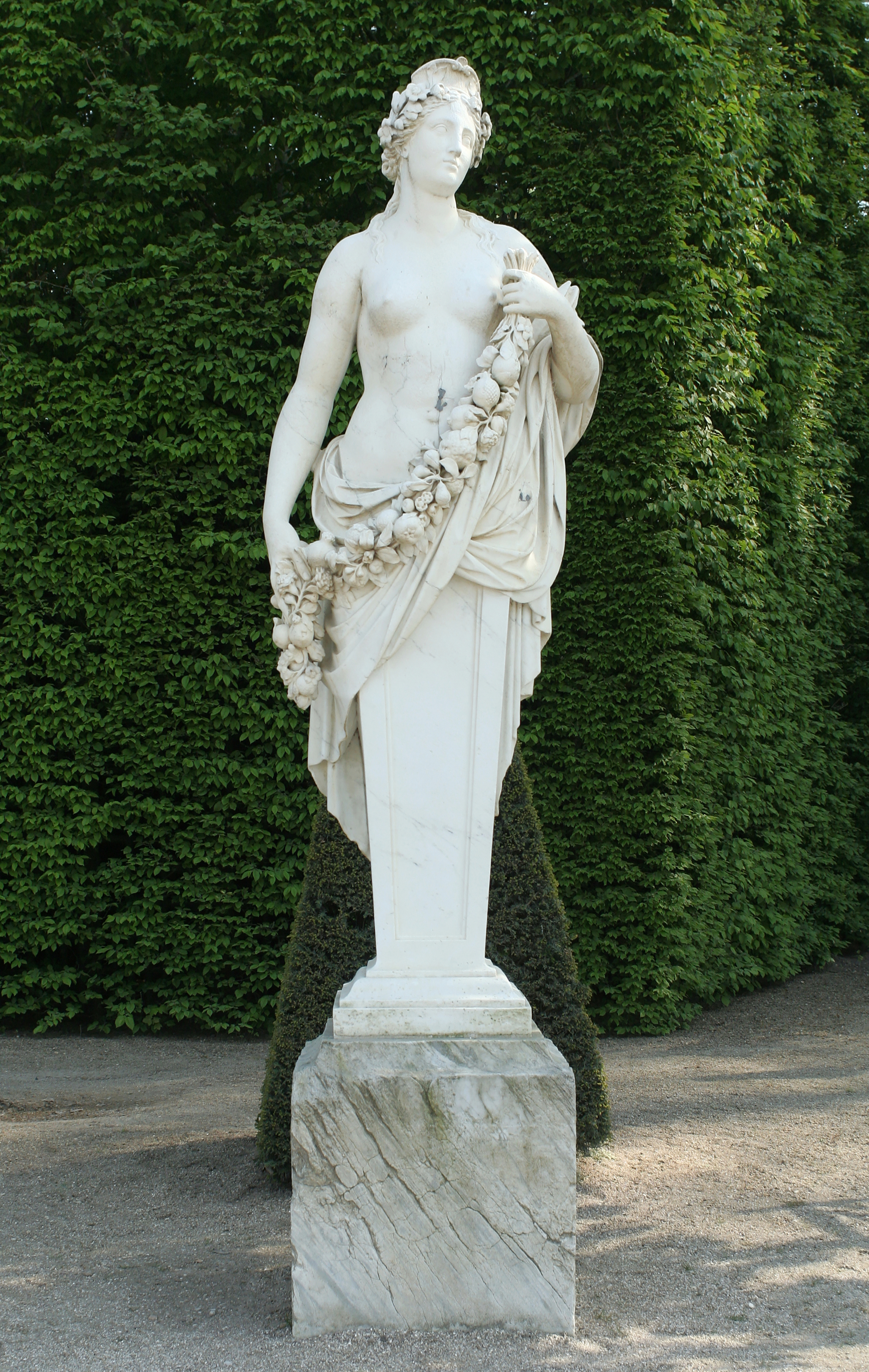 Parc de Versailles, demi-lune du bassin du Char-d'Apollon. Pomone portant un diadème et tenant une guirlande de fruits et de fleurs sur sa poitrine, par Étienne Le Hongre, 1684-1689.inv1850n°9142 sculpture on marble Height: 2.2 m (86.6 in) dimensions QS:P2048,2.2U11573